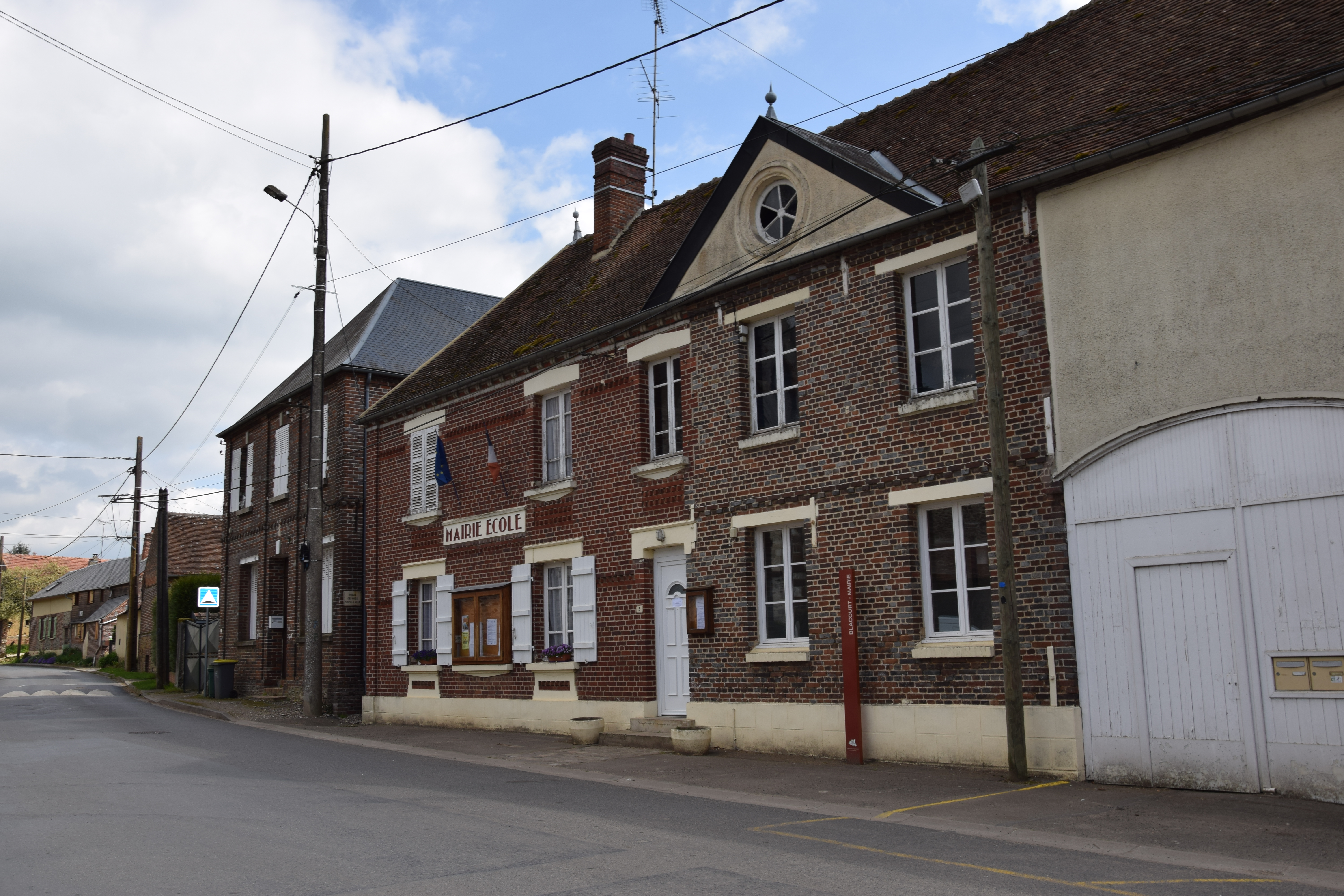 Blacourt